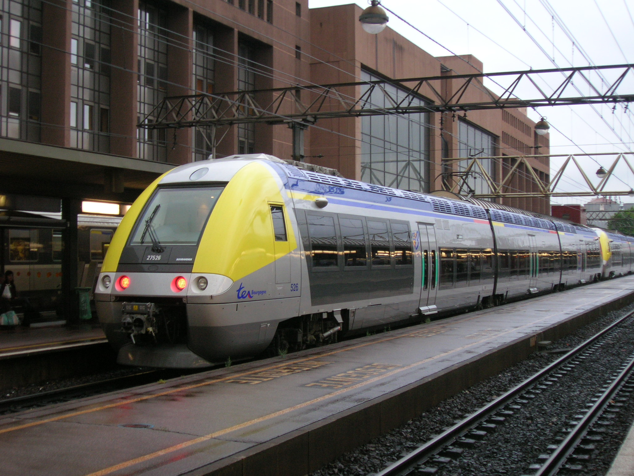 Automotrice Z 27526 à la Gare de la Part-Dieu, Lyon, France